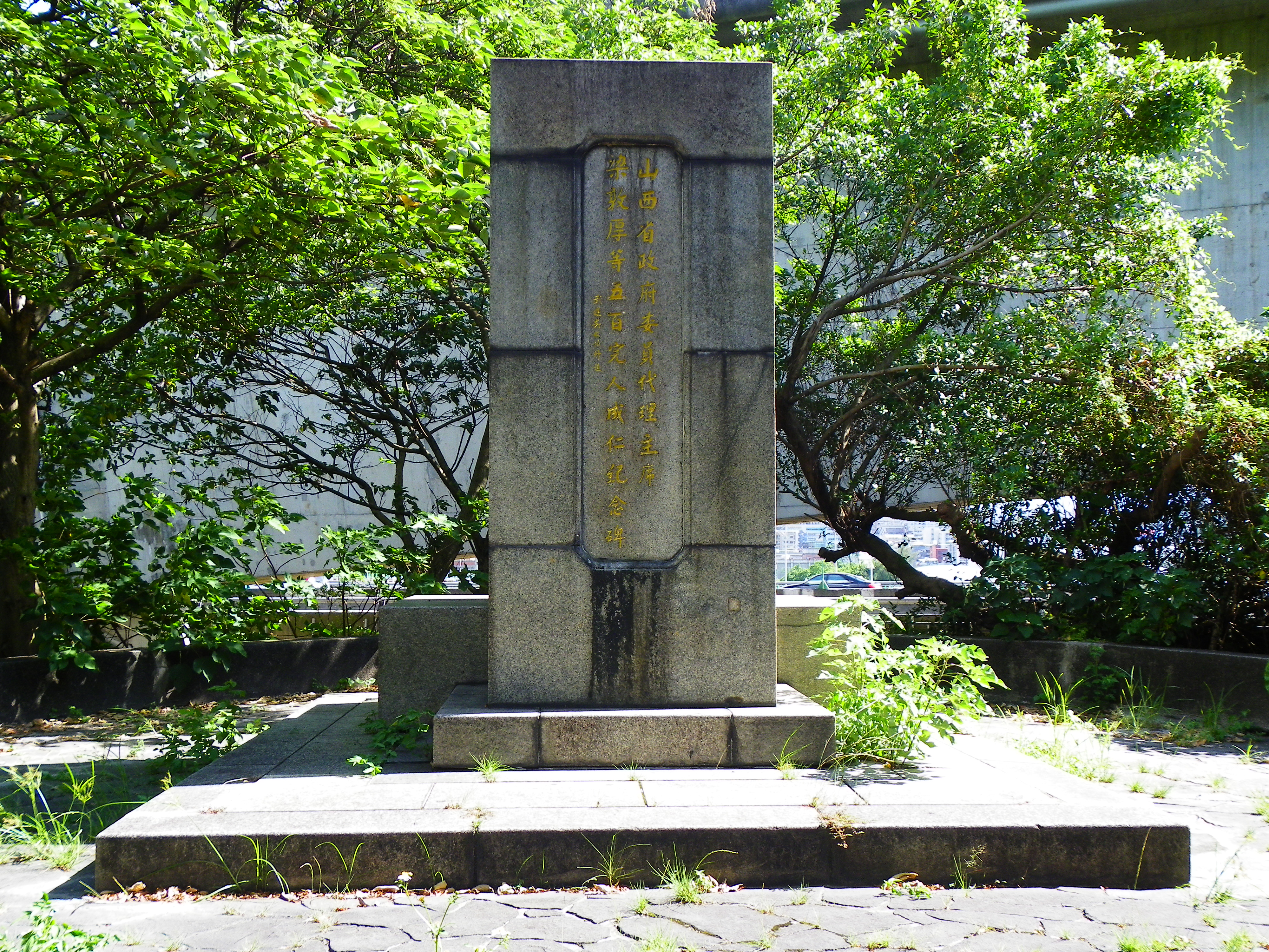 臺北市中山區劍潭山太原五百完人招魂塚前庭的太原五百完人成仁紀念碑正面，吳敬恆題。